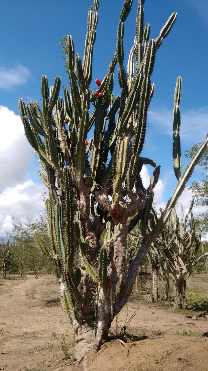 Árvore encontrada no sertão da Bahia, esta foi na cidade de Santa Bárbara, na Bahia.